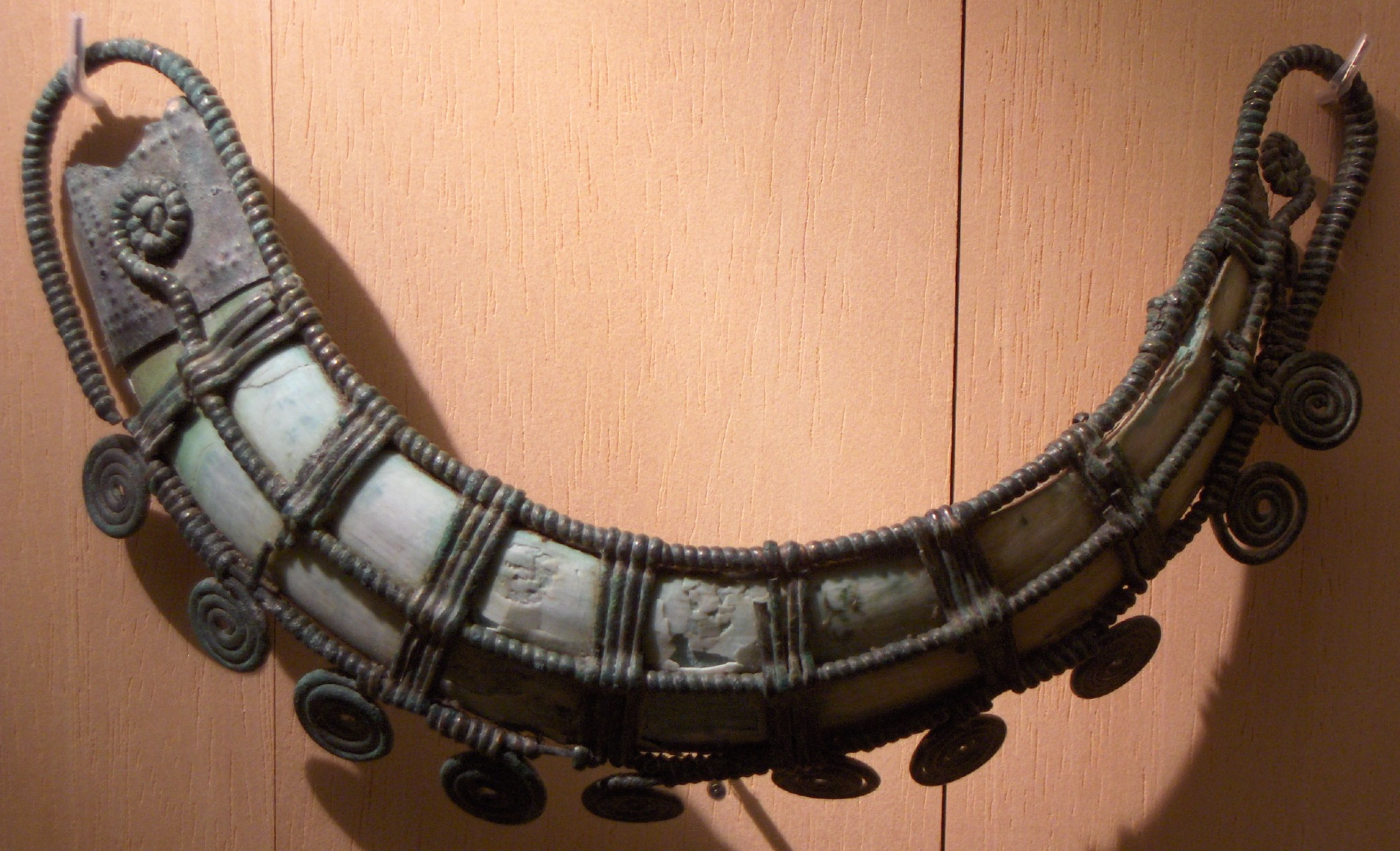 Parure, âge du bronze, musée des antiquités nationales (Saint-Germain-en-Laye, France)